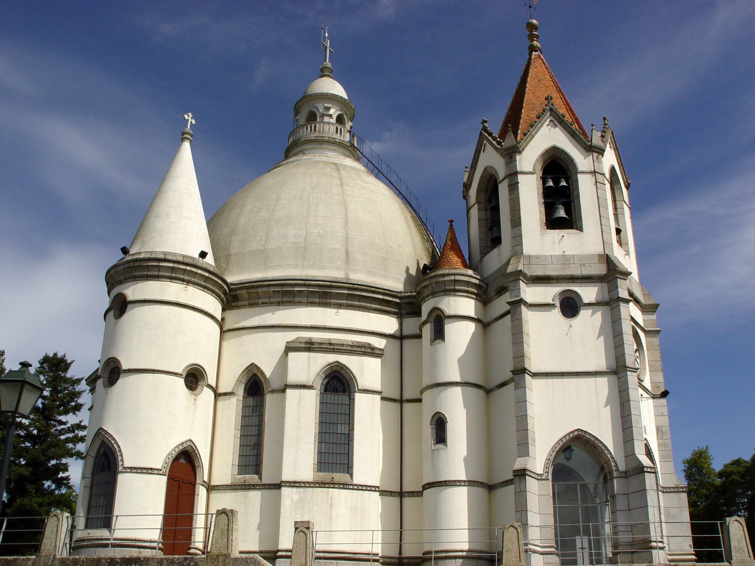 Santuário da Senhora da Piedade e Santos Passos This file was uploaded for Wiki Loves Monuments in Portugal with the unique identifier 97022834.